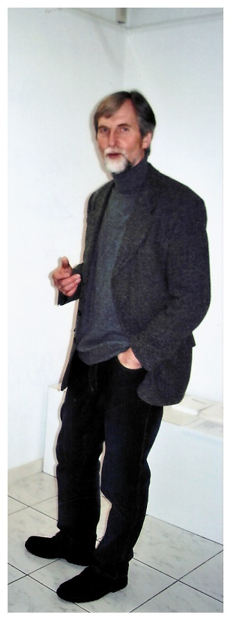 Burkhardt Rokahr bei einer Vernissage 2006